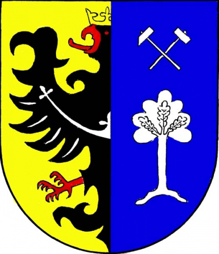 Znak obce Doubrava (okres Karviná)